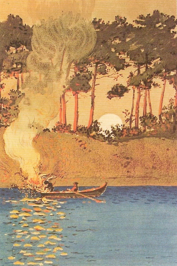 La pêche au flambeau sur le bassin d'Arcachon (Aquitaine) Jean Paul Alaux (1909)